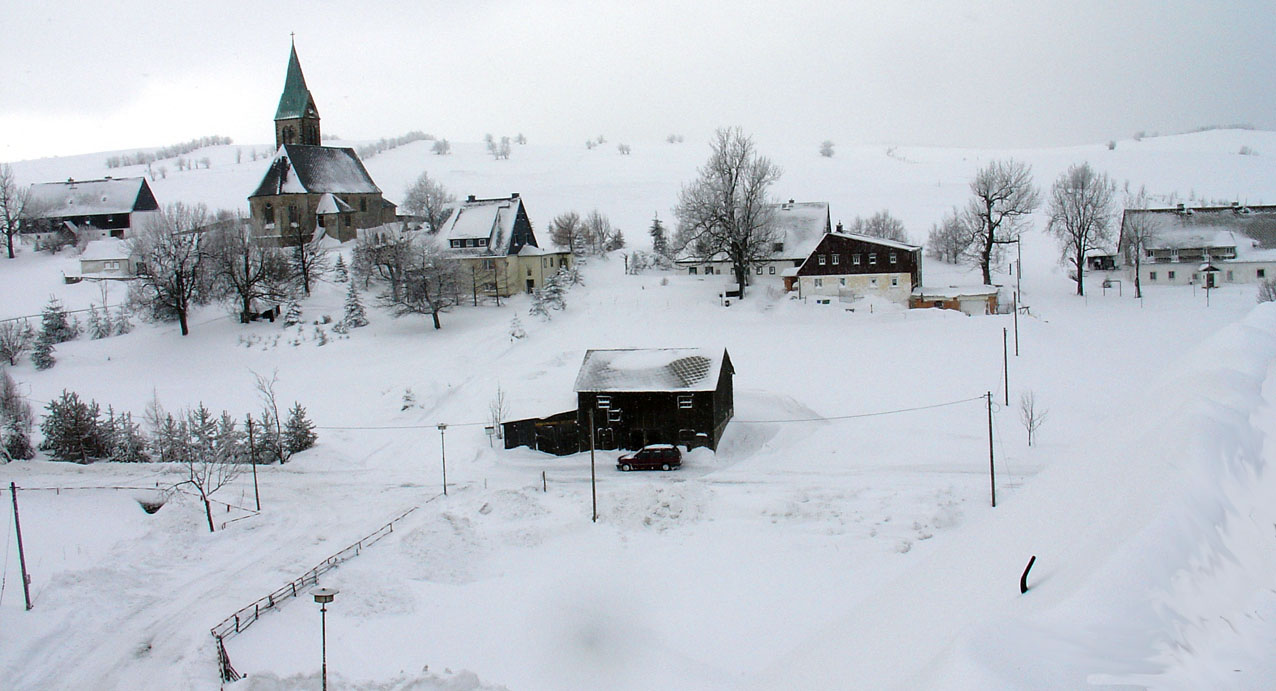 Fürstenau Mitteldorf, Kirche (central part with church)